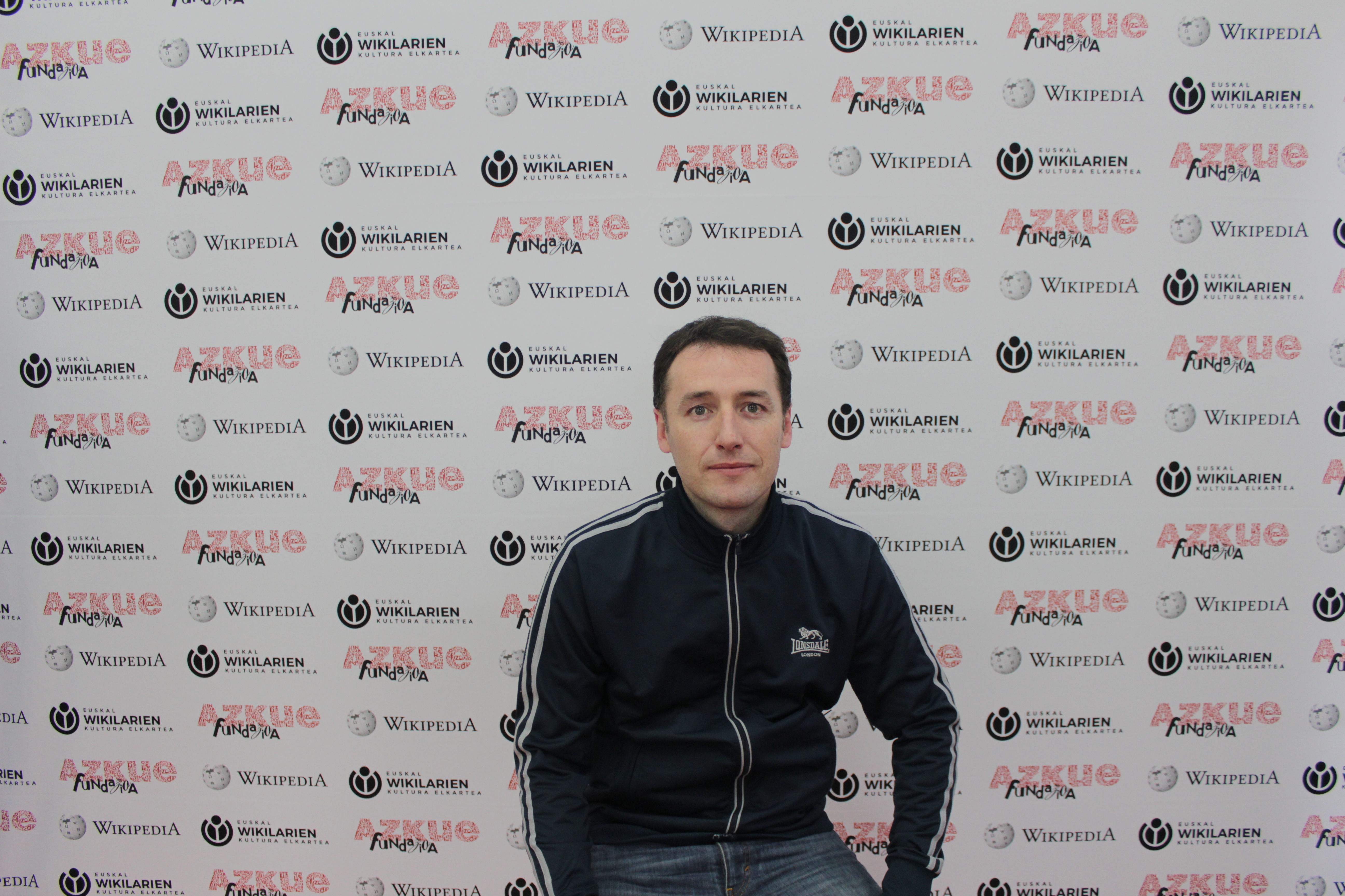 Ibon Altunak Durangon eginiko Photocallean ateratako argazkia